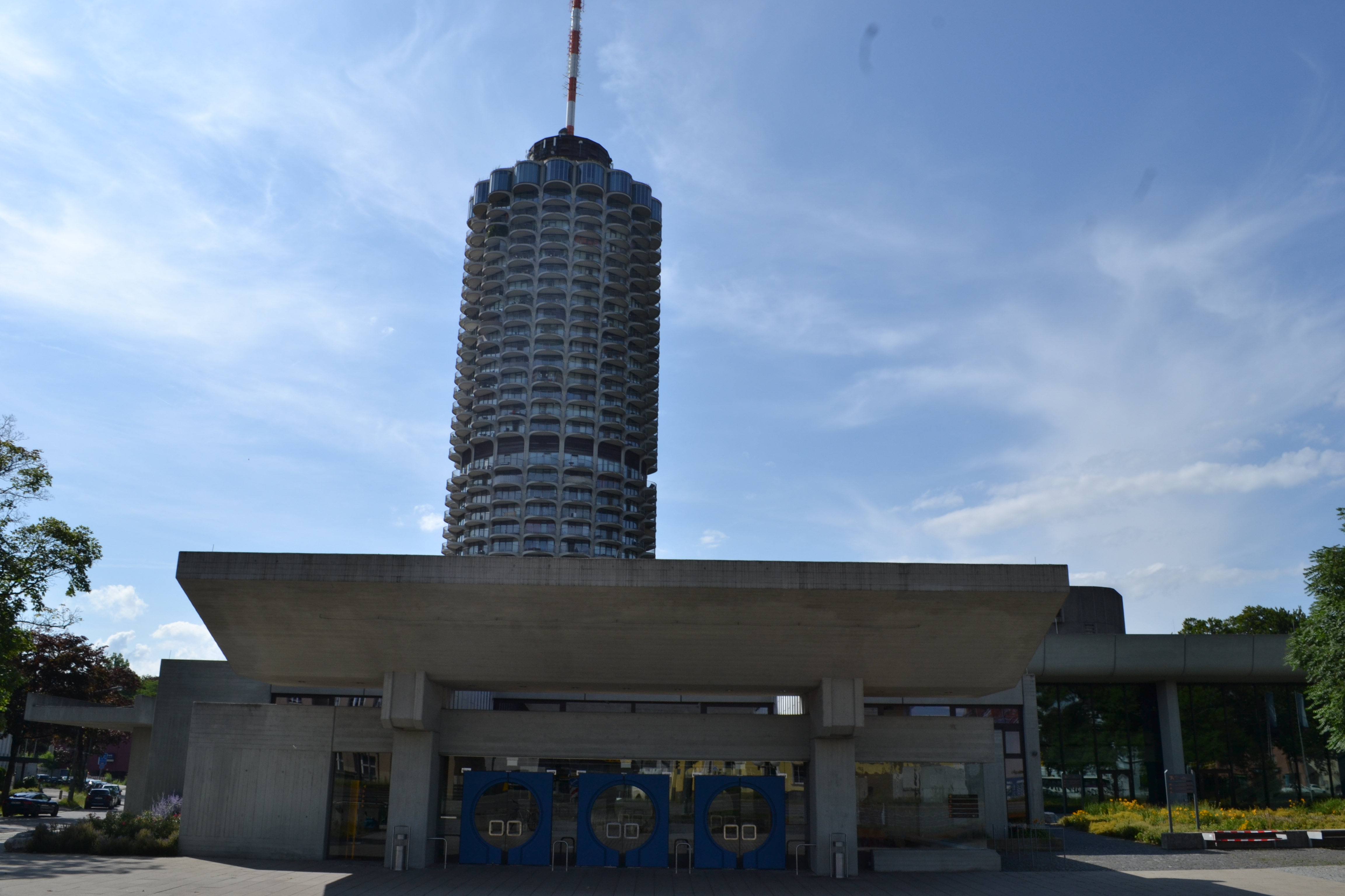 Der Augsburger Hotelturm mit der Kongresshalle.